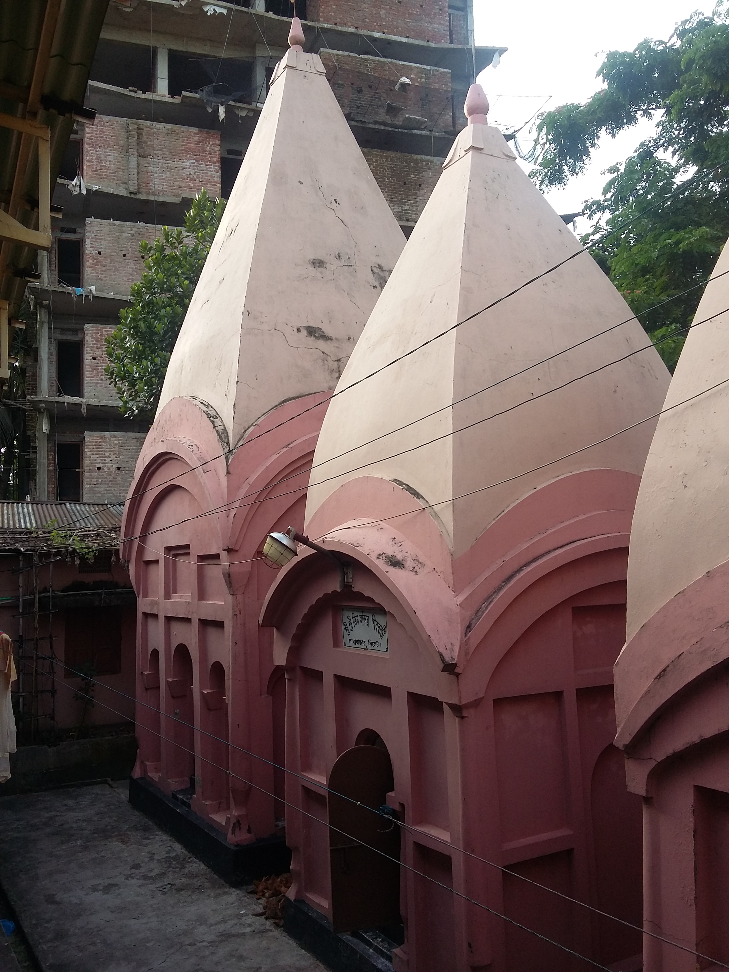 তিন মন্দির (রাজা গম্ভীর সিং-এর মন্দির)